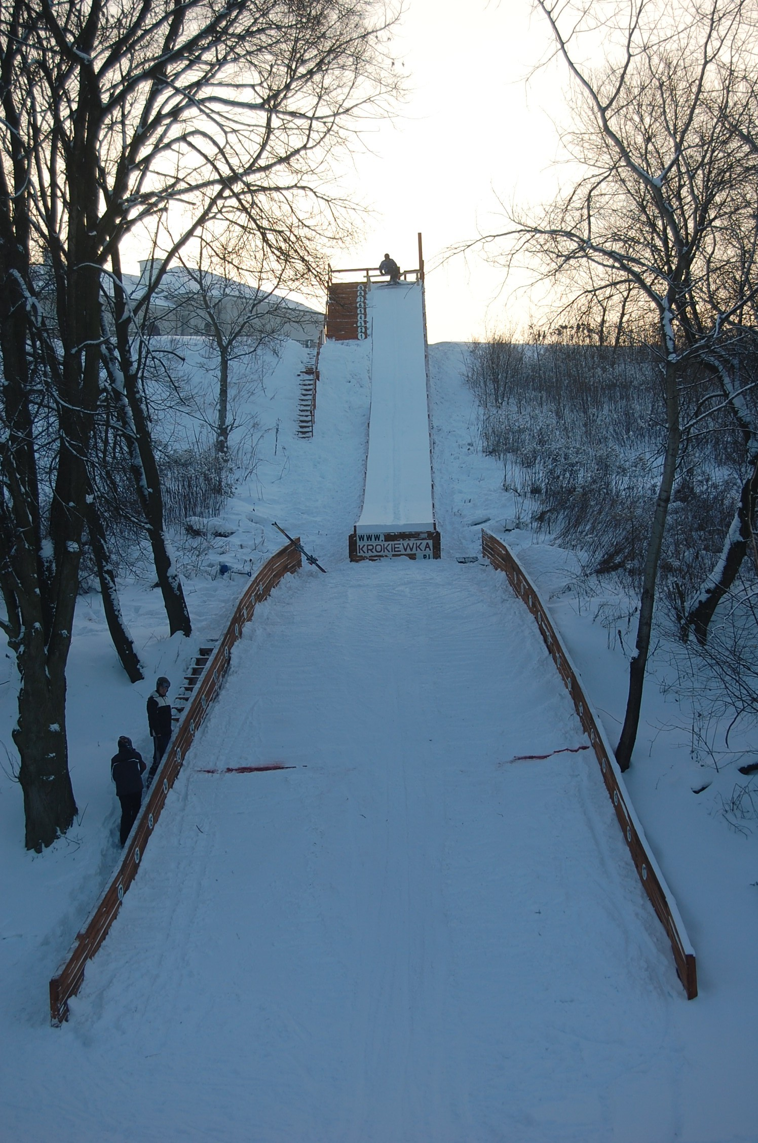 Skocznia narciarska Krokiewka w Lublinie K13 (os. Węglin) krokiewka.pl